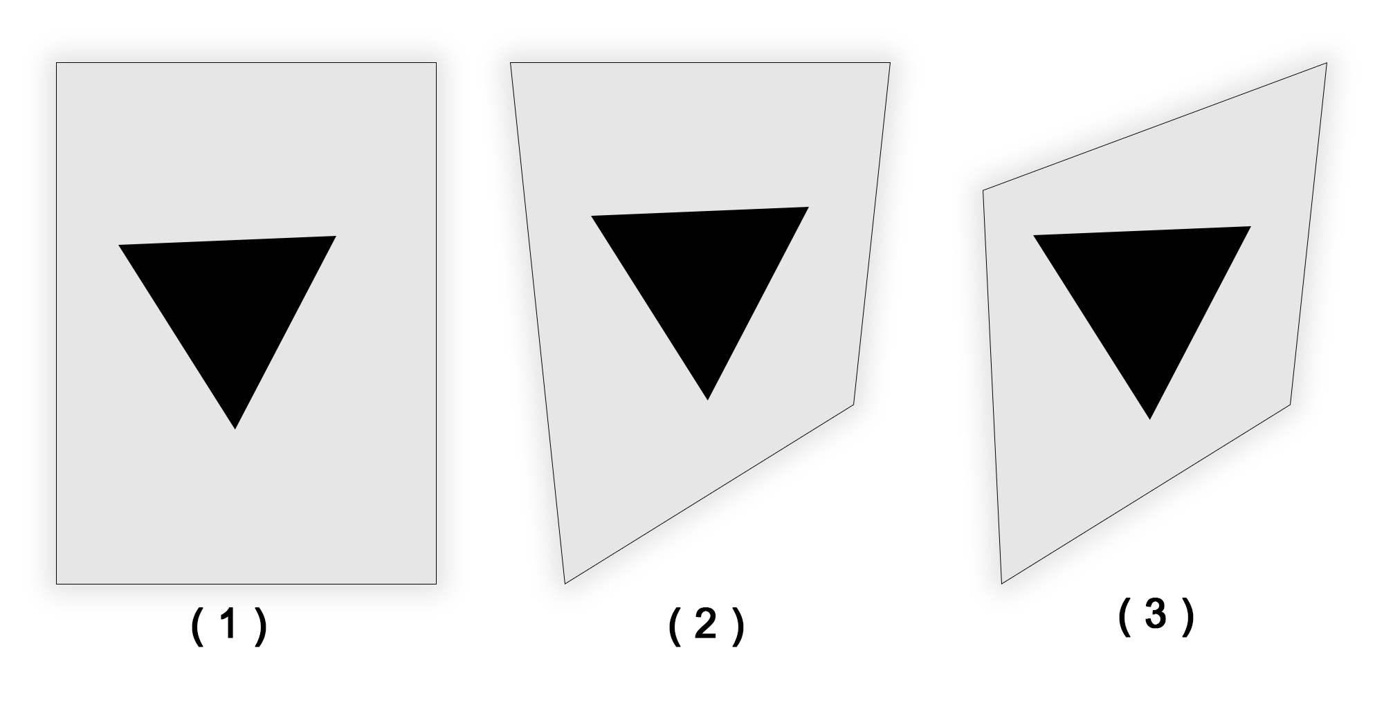 این تصویر روند فروپاشی قاب مستطیل و تغییر گشتالتی بیان مثلث در قبال کادر را نمایش می دهد